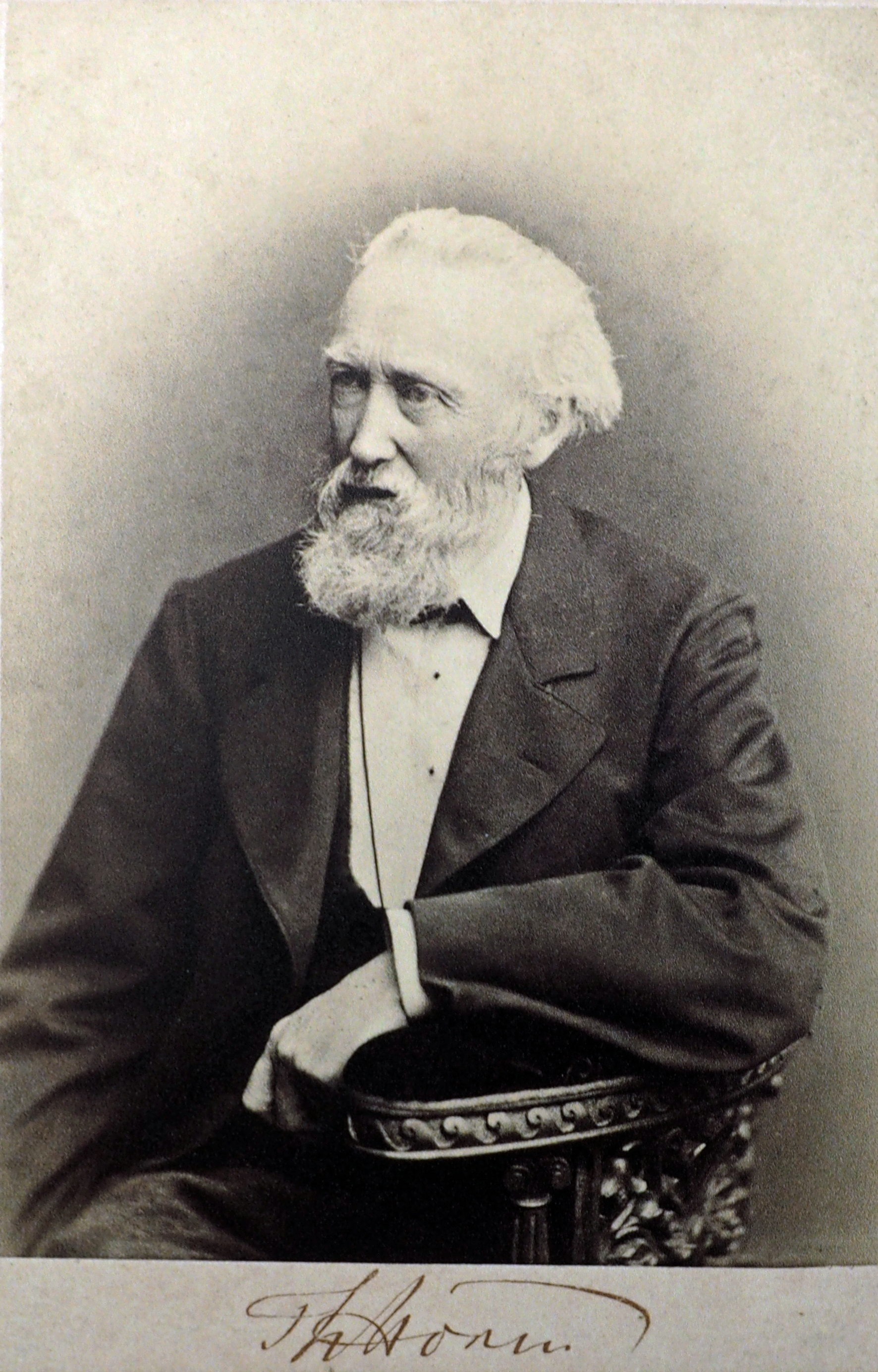 Theodor Storm (Foto aus einer öffenltich aufgestellten Infotafel)